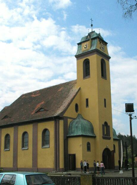 Kościół św. Józefa Robotnika w Zawiści